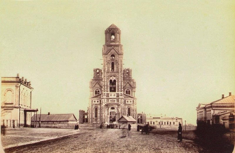 Строящийся второй Вознесенский собор на площади Ермака в Новочеркасске около 1862 года